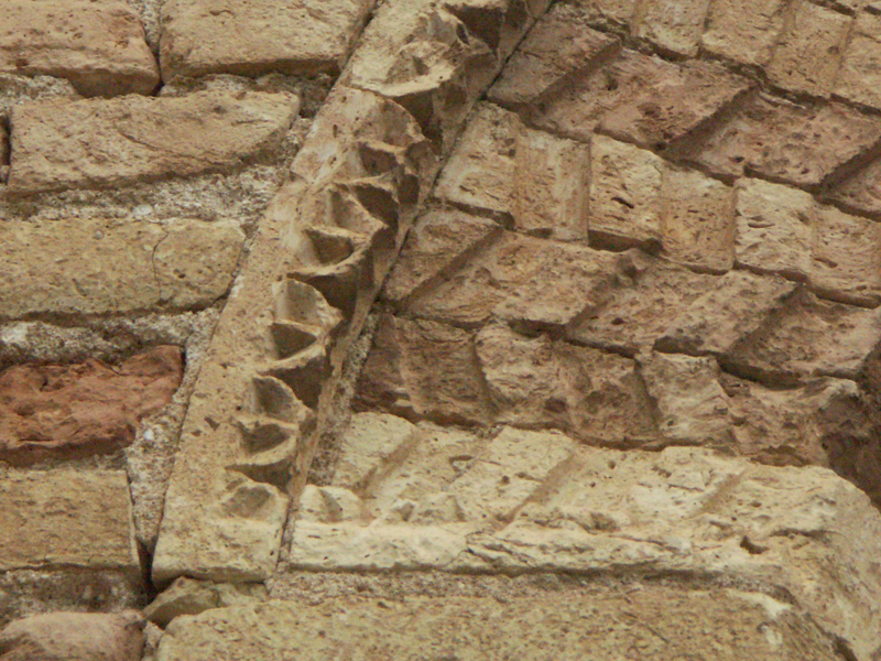 Dettaglio della strombatura di una monofora della Chiesa di Santa Maria in Castello a Cupra Marittima, in provincia di Ascoli Piceno, in Italia.